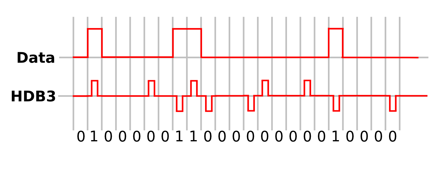 Codebeispiel in HDB3